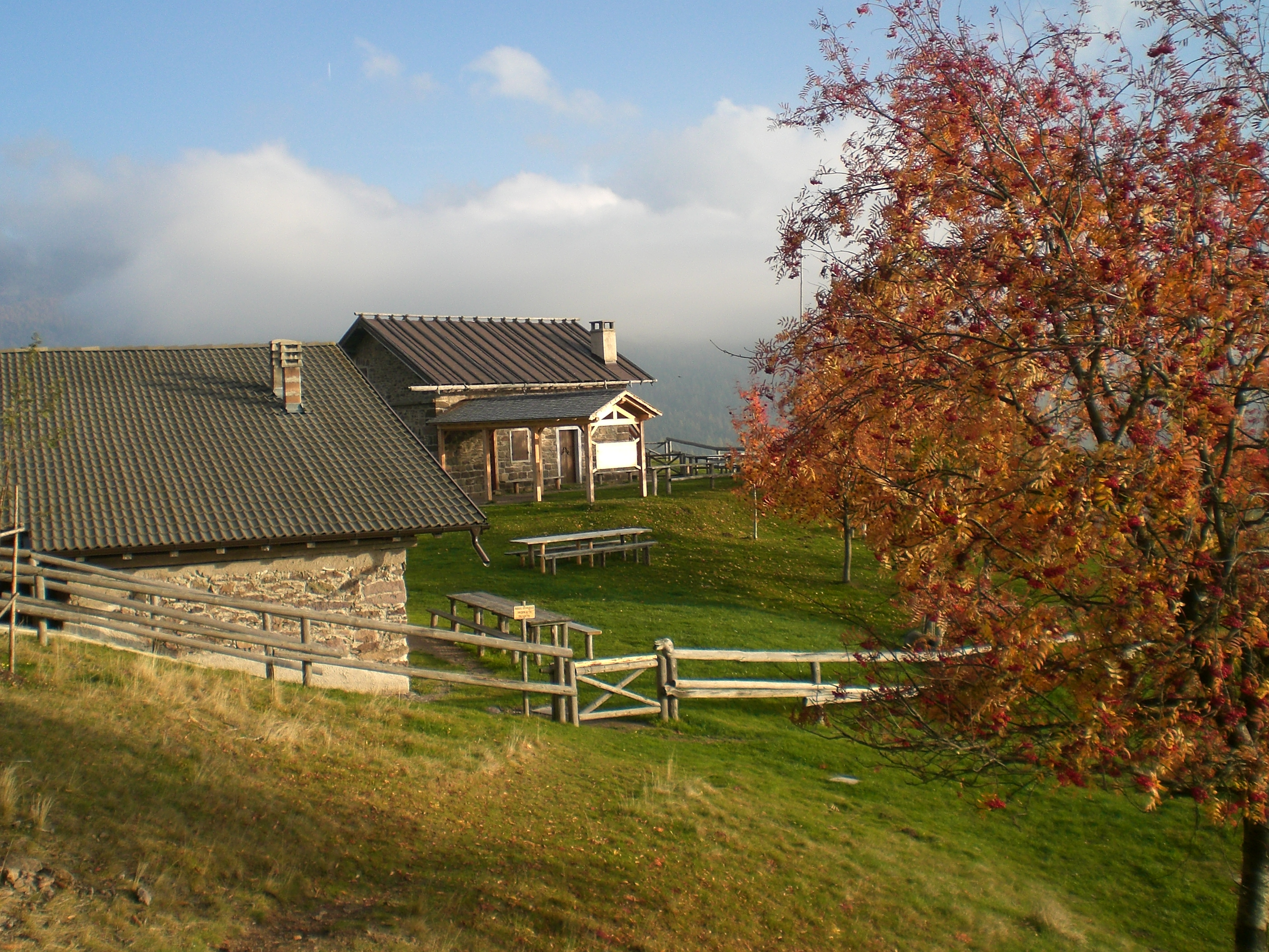 Autore Vito Ermon foto Malga Pec (Uso Civico di Viarago) LIcenza:pubblico dominio